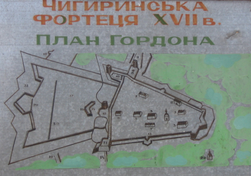 Chyhyryn (Ukrainian: Чигирин